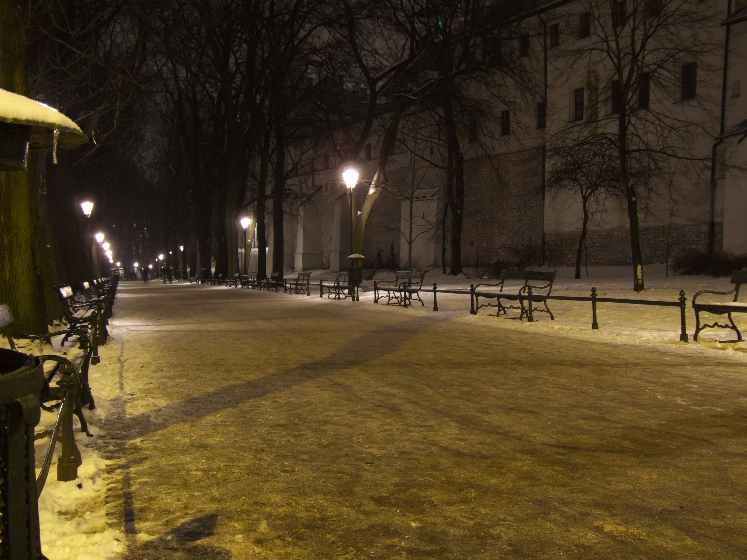 Planty krakowskie w nocy (widok od ulicy Dominikańskiej)